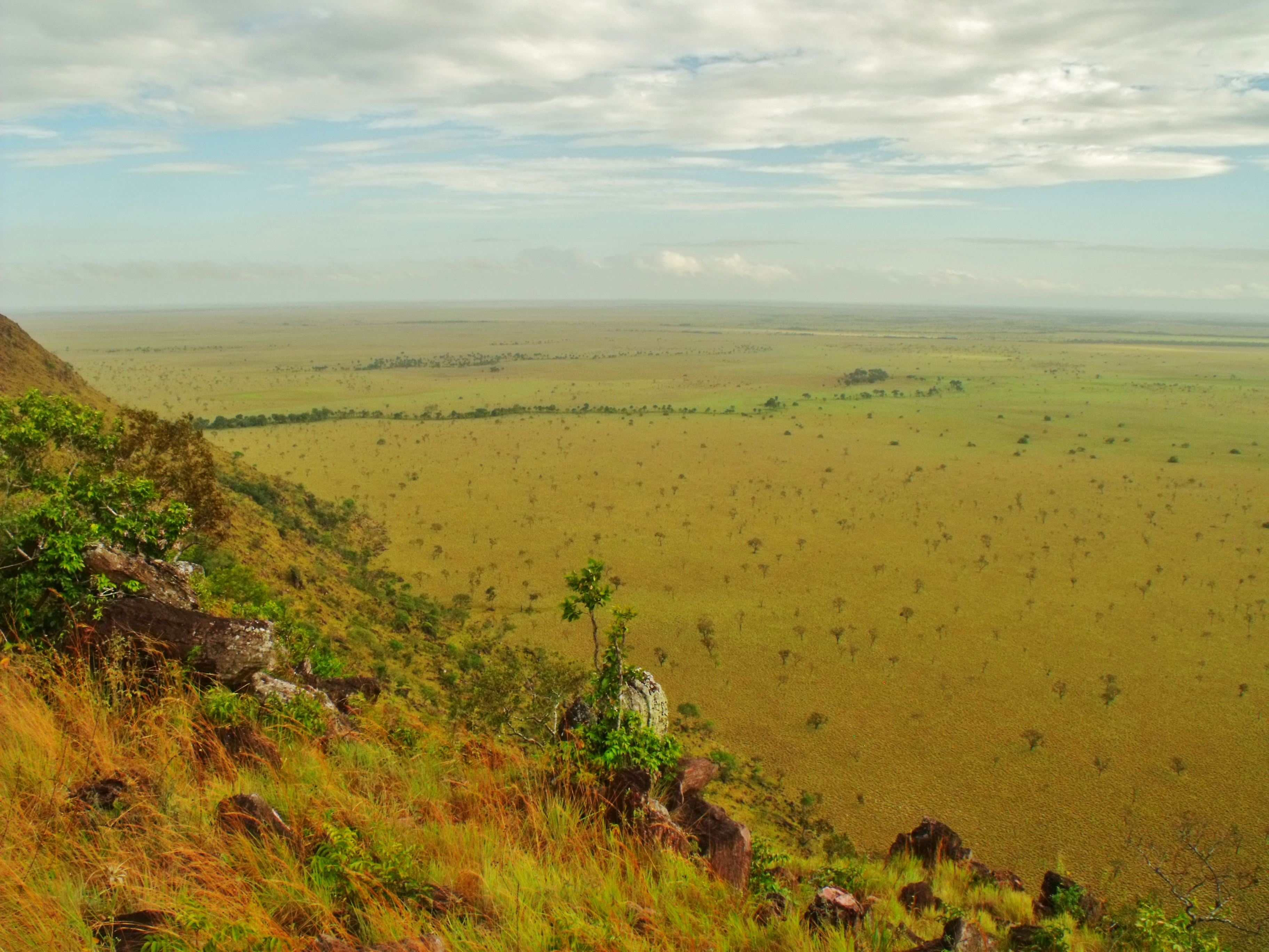 Llanuras de gramínea. Vista desde las Galeras del Cinaruco, Parque nacional Santos Luzardo.